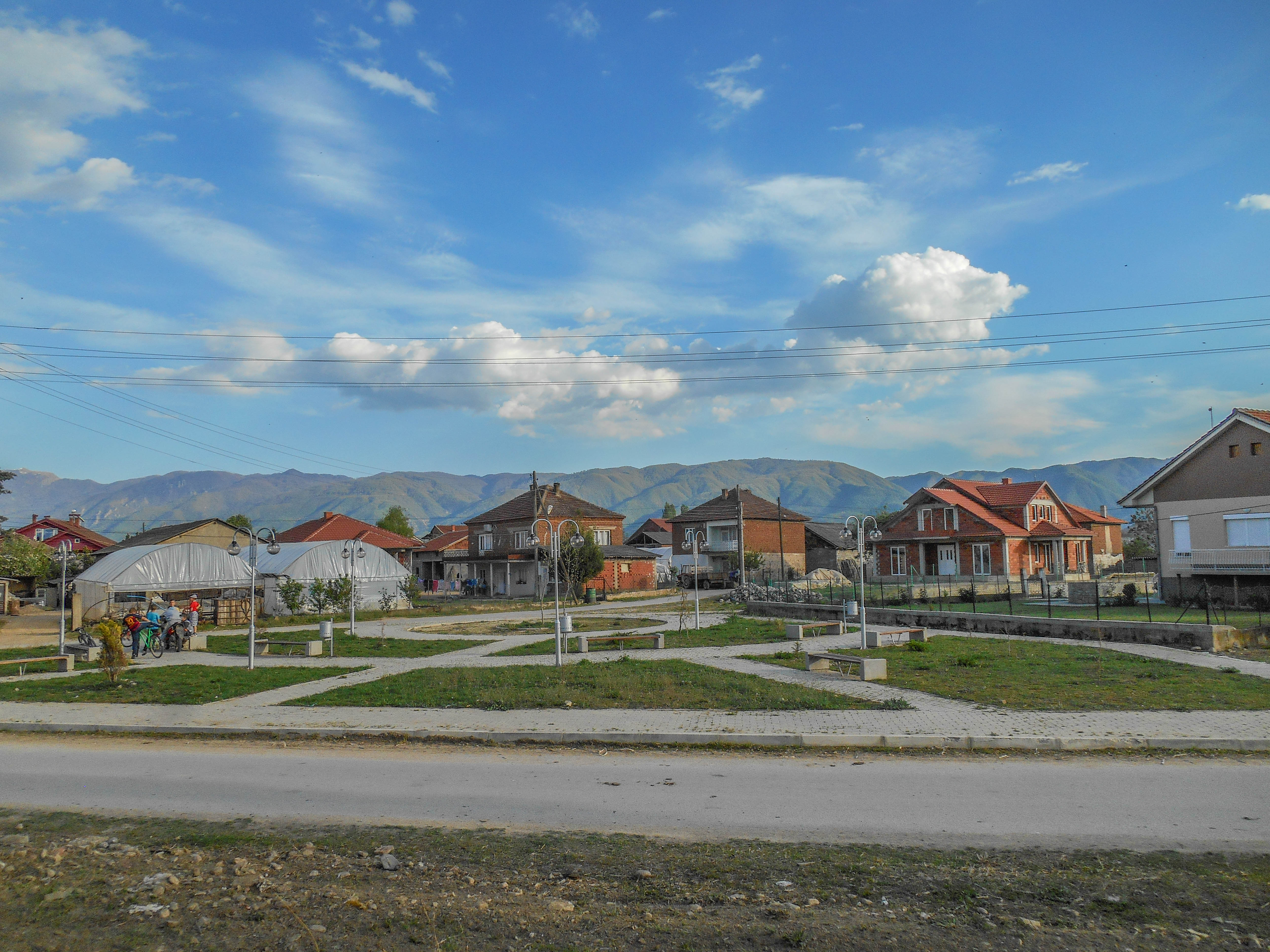 Поглед кон селото